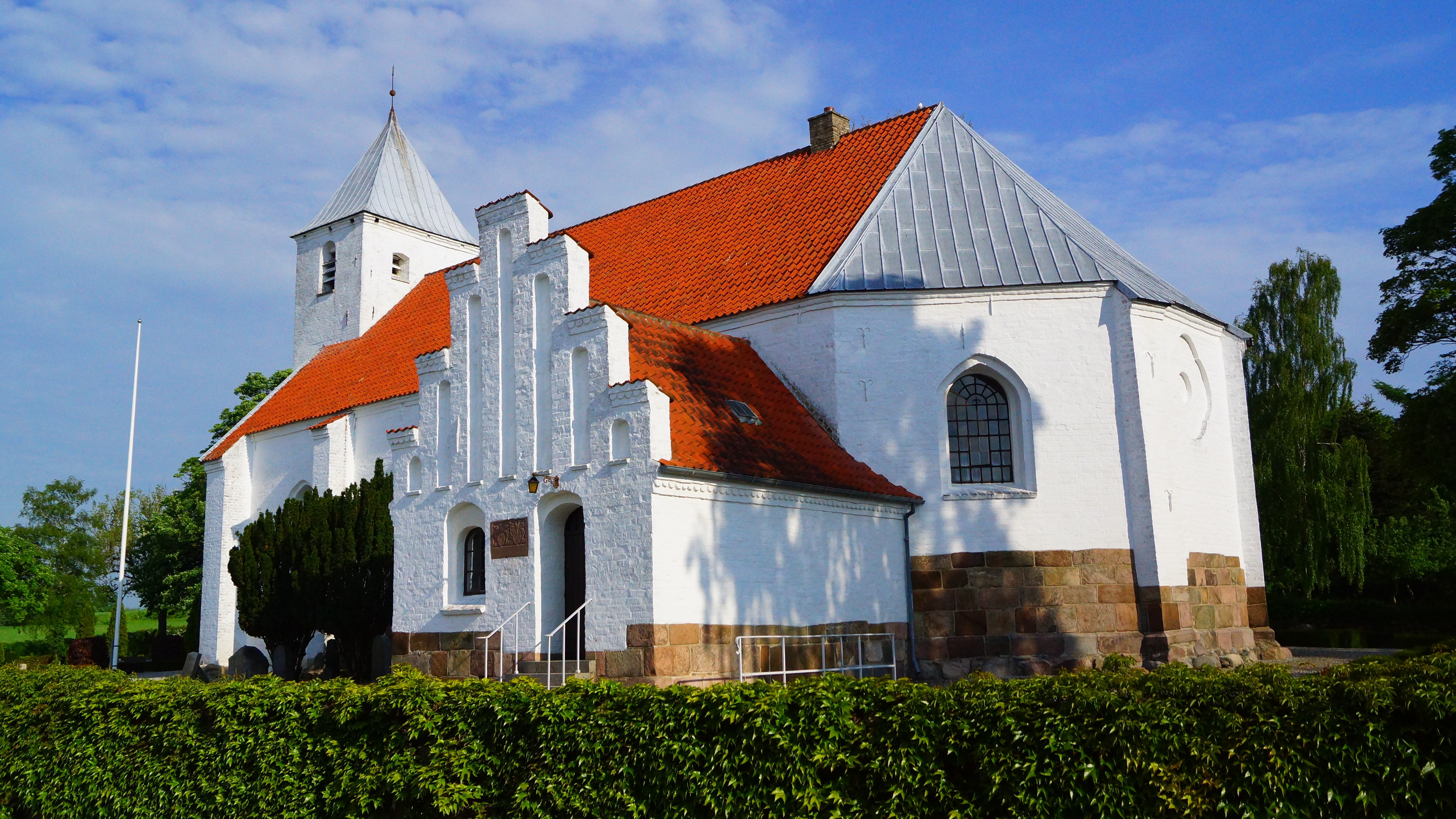 Tirstrup Kirke 1